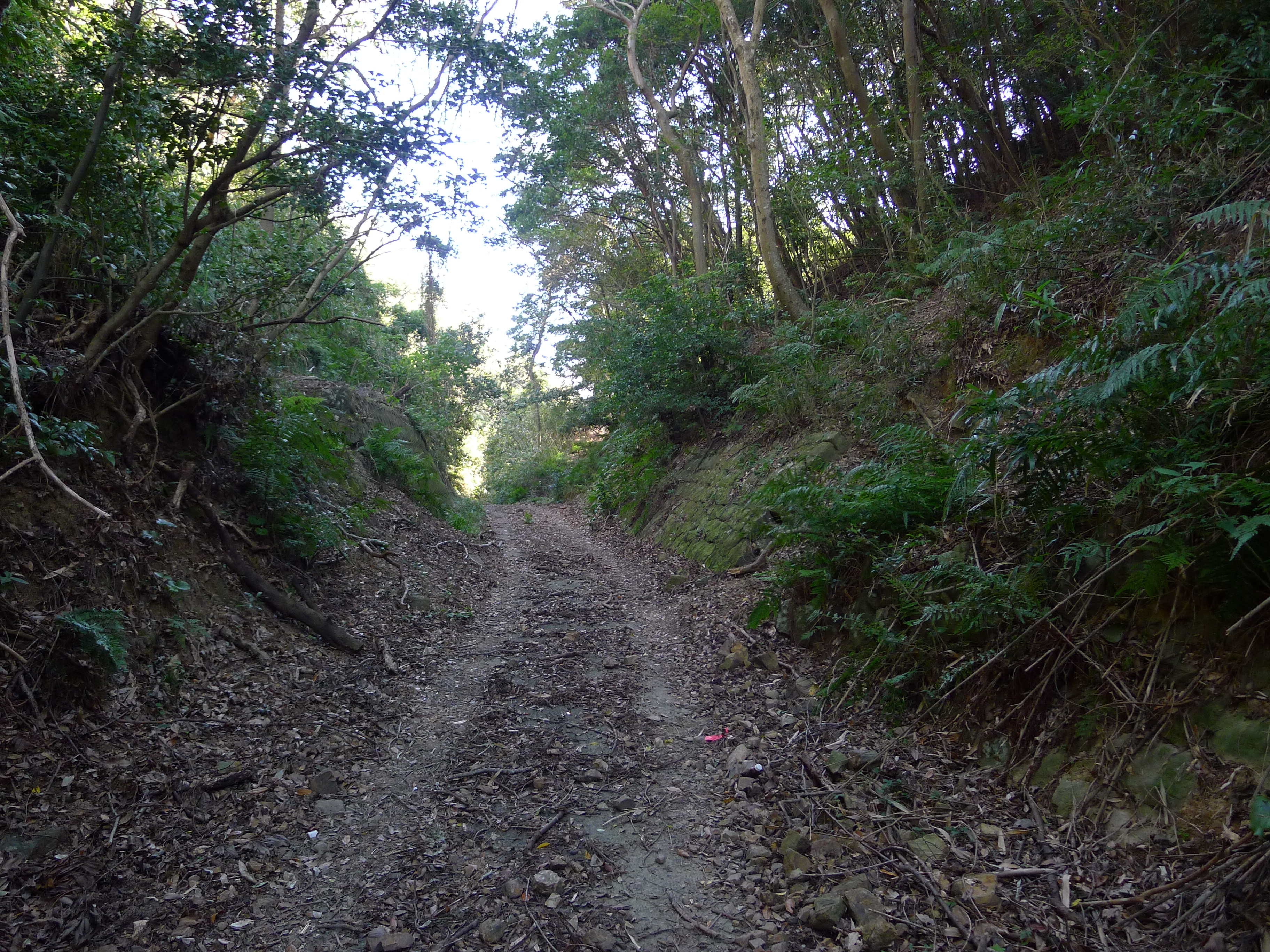 熊野古道紀伊路の榎木峠（和歌山県印南町）